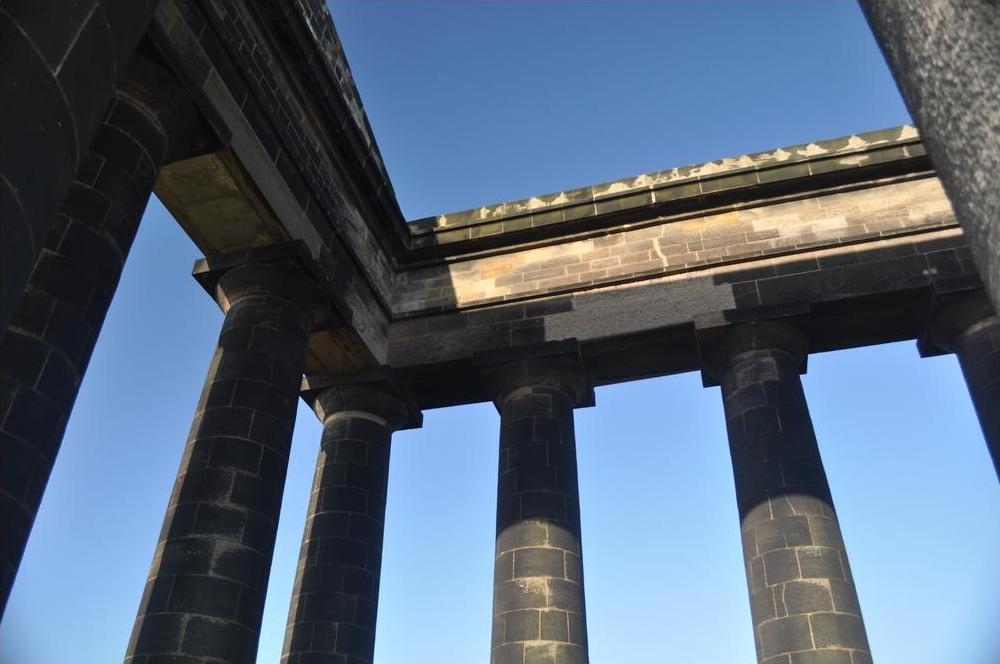 Monument detail